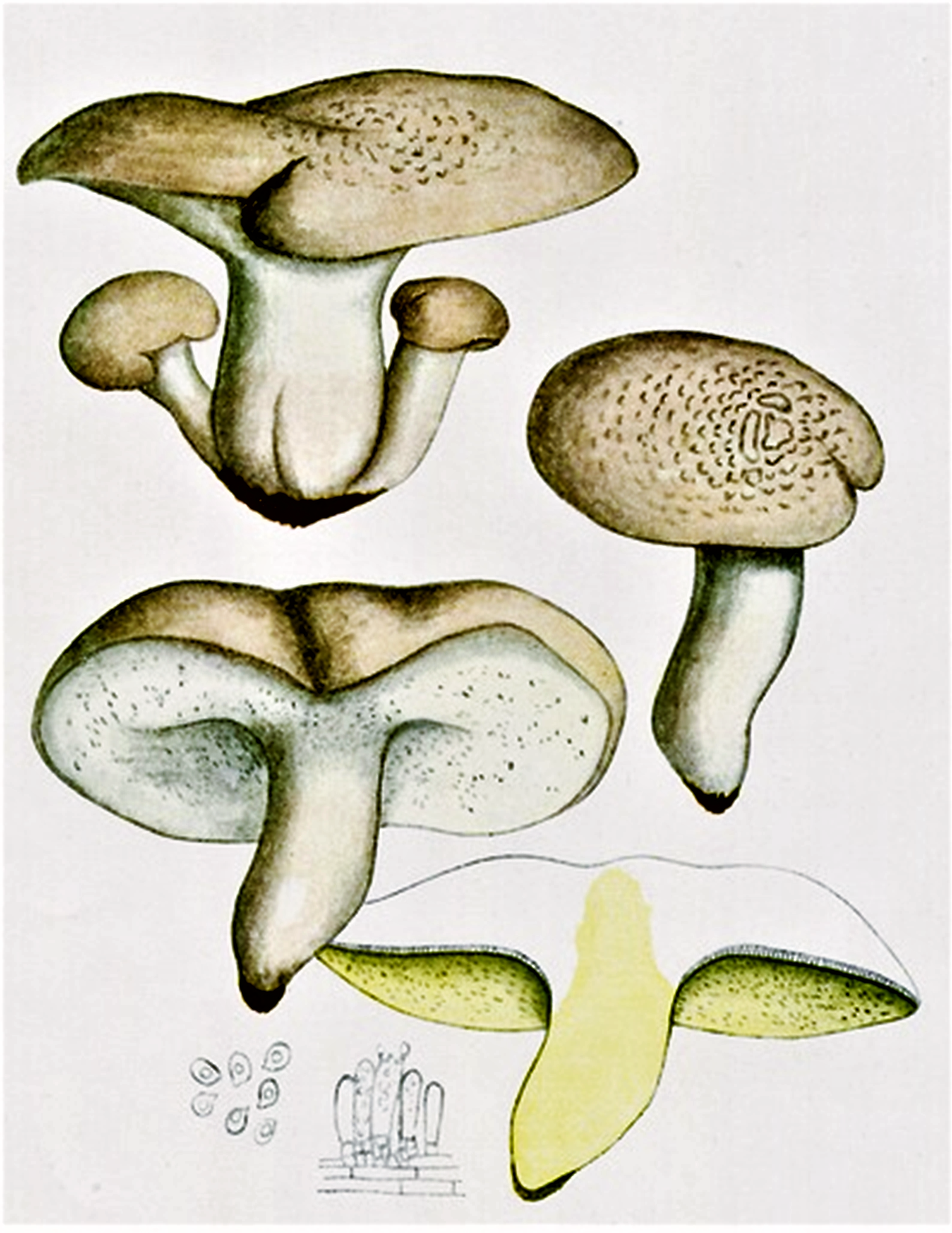 Giacomo Bresadola: Polyporus ovinus ((Schaeff.), 1774 ex Fr. (1821), heute Albatrellus ovinus (Schaeff.) Kotl. & Pouzar (1957)